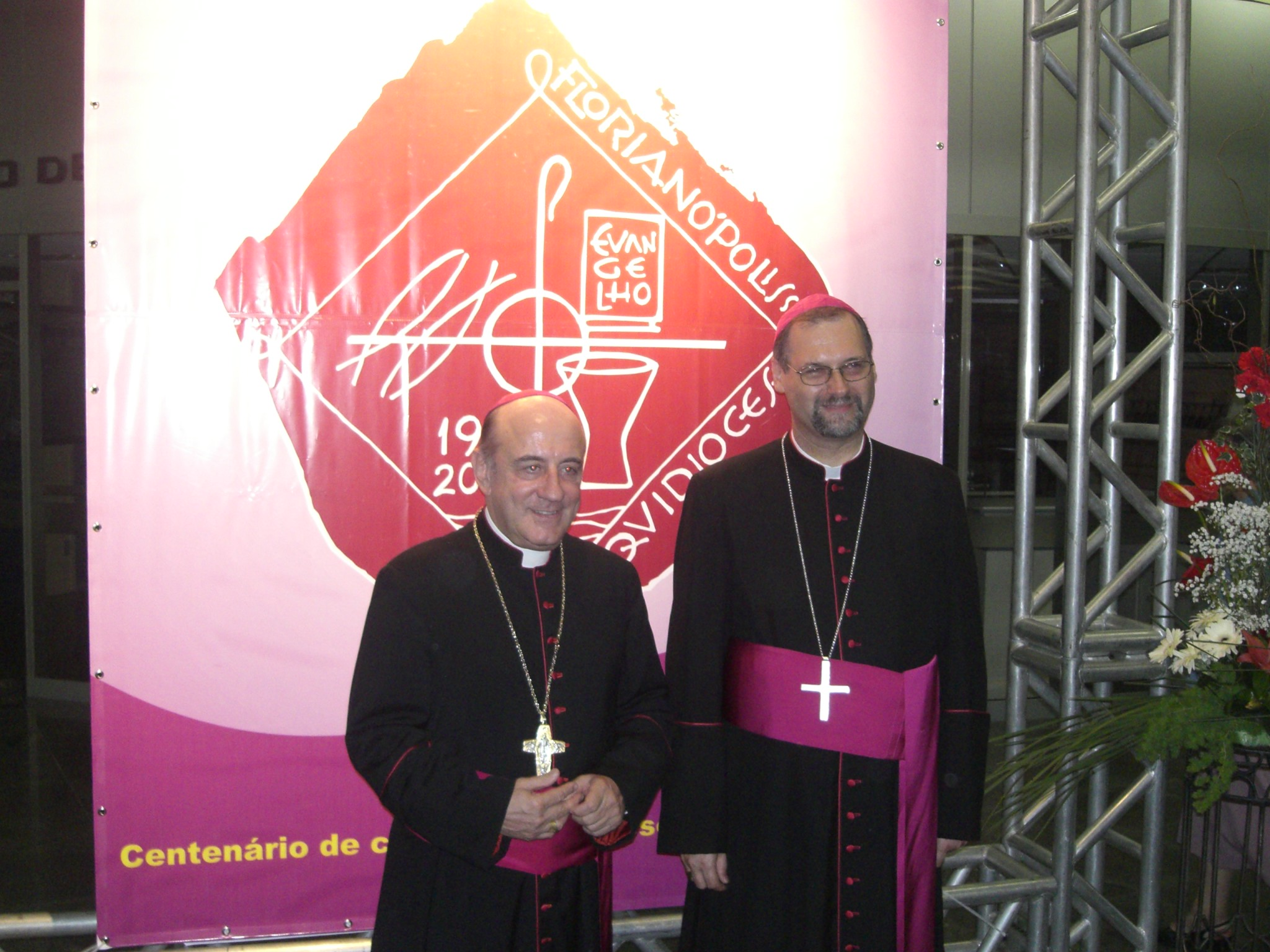 Dom Murilo Krieger, Arcebispo, e Dom José Negri, bispo auxiliar, de Florianópolis, na sessão solene, na Assembléia Legislativa de Santa Catarina, em comemoração ao centenário de criação da diocese de Floriaópolis.